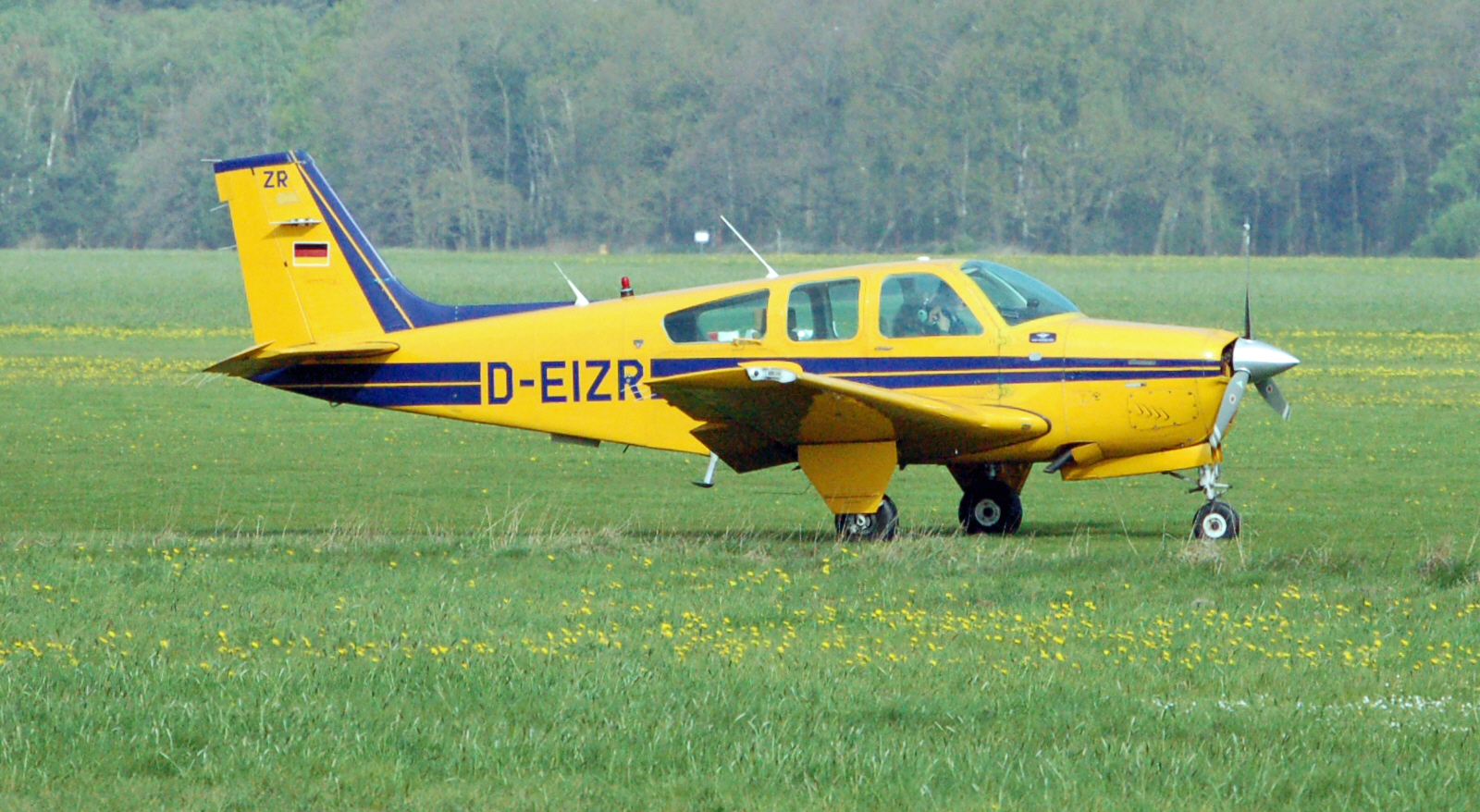 Beechcraft Bonanza F33A auf dem Flugplatz Uetersen